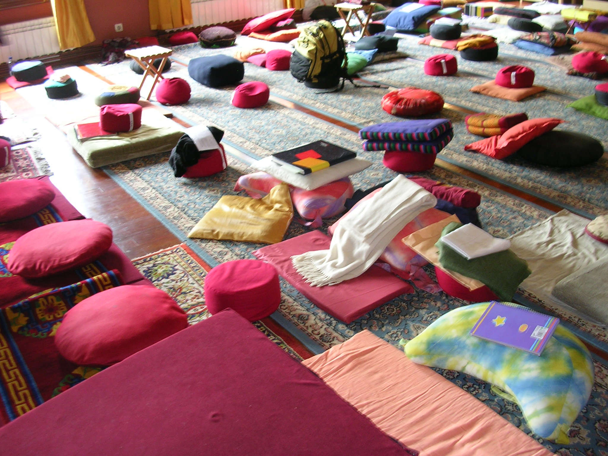 Monasterio de Dag Shang Kagyü en Panillo